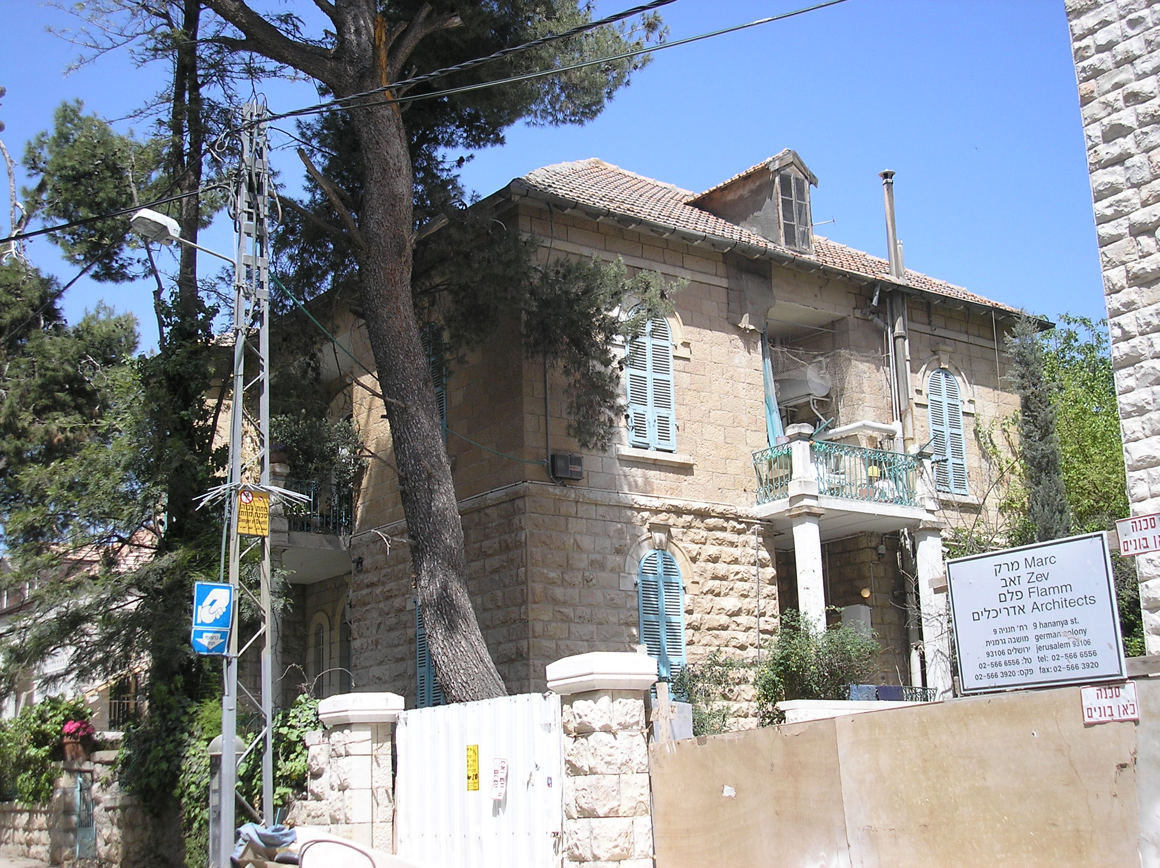 Mughannam apartments next to Beit Mughannam, Talbiya, Jerusalem